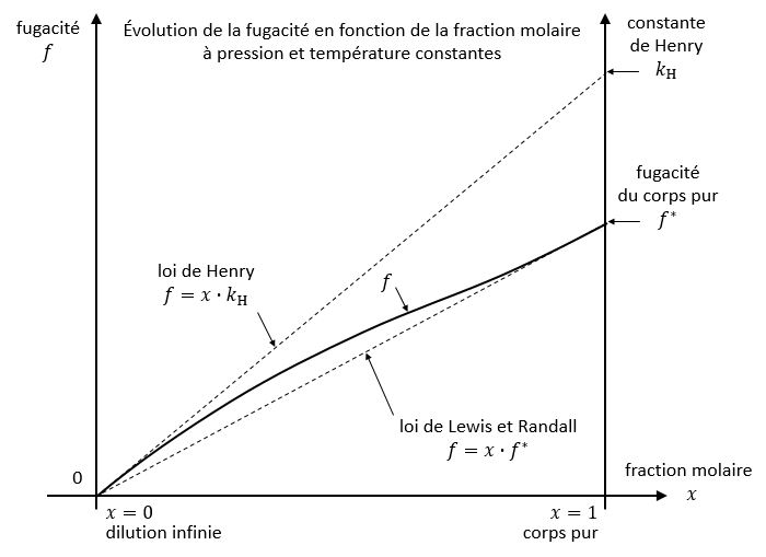 Évolution de la fugacité en fonction de la fraction molaire à pression et température constantes. Lois extrêmes : loi de Henry et loi de Lewis et Randall.